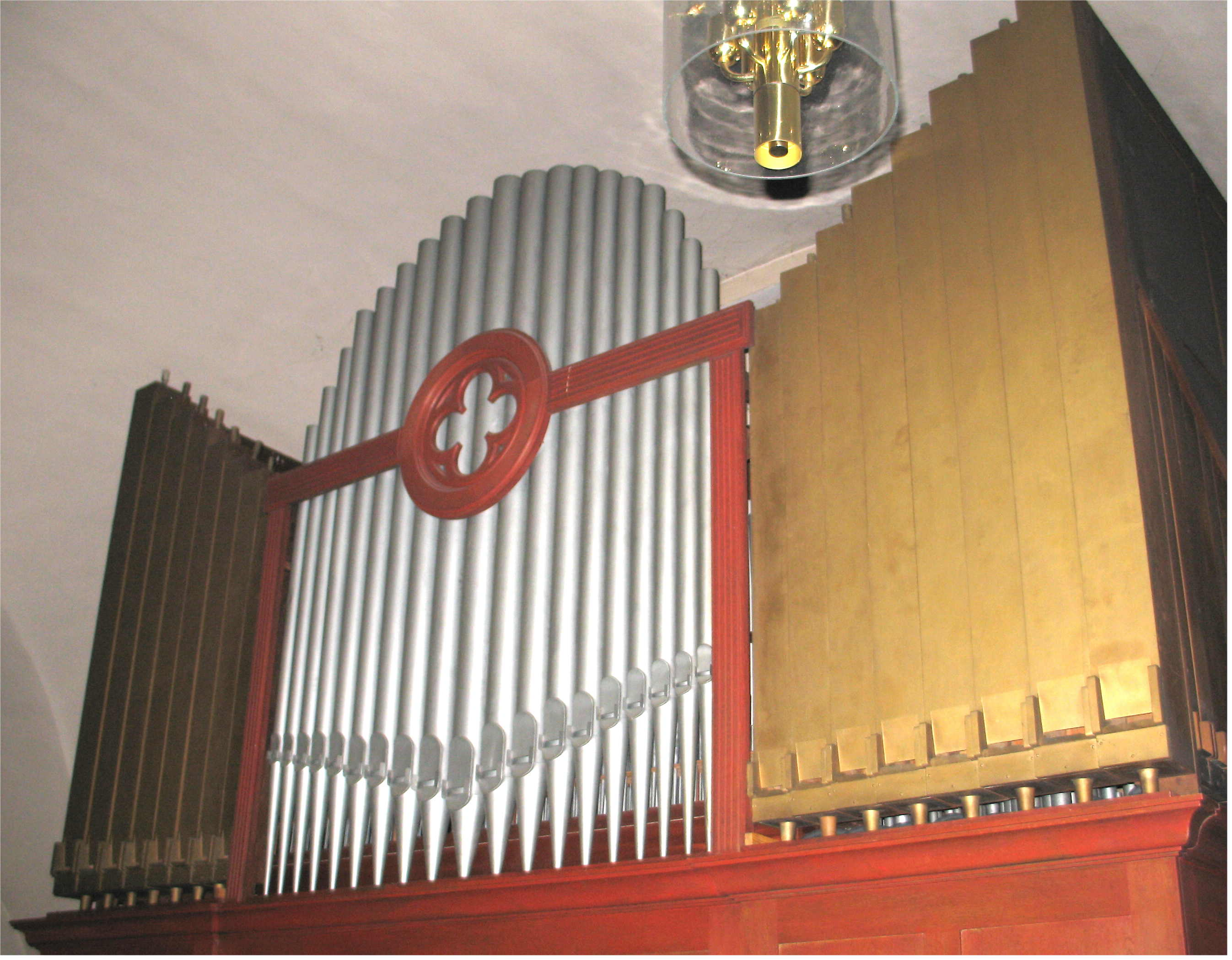 Uergel an der Kopleschter Kierch (Abrëll 2006)